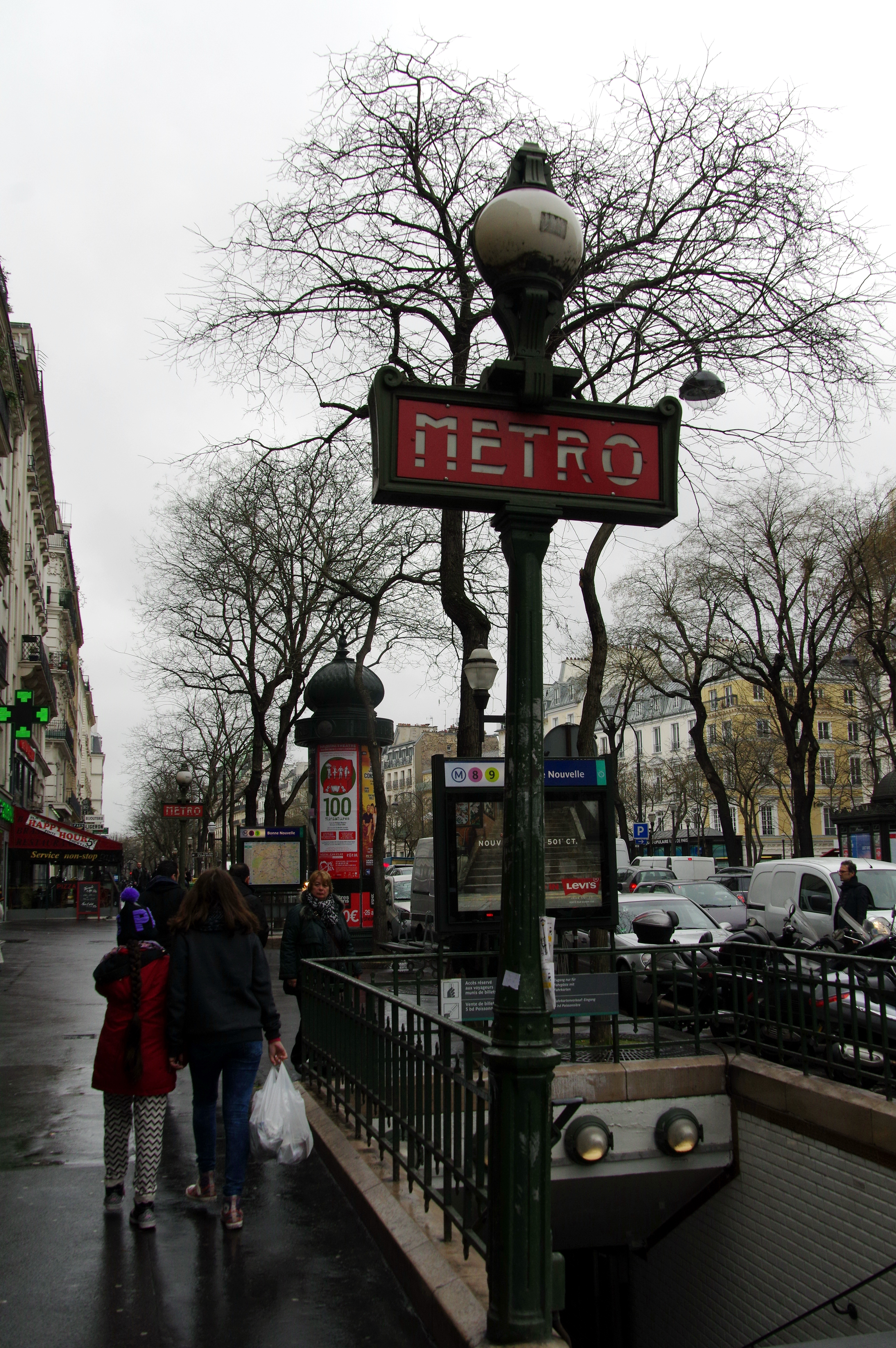 Bonne Nouvelle (Paris Metro)